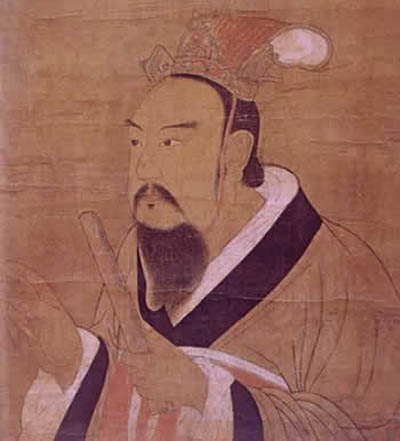 Représentation de l'empereur Wudi de la dynastie Liang.